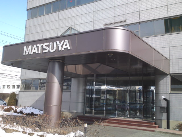 株式会社マツヤ本社（長野県長野市北尾張部）